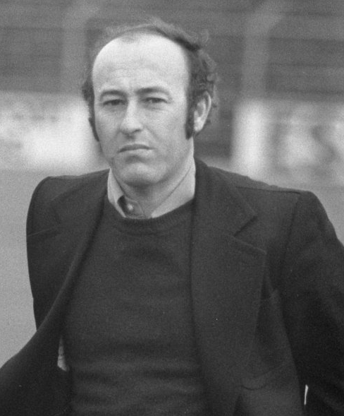 Ger Blok is een voormalig Nederlands voetbaltrainer.